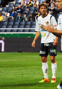 Jakob Orlov